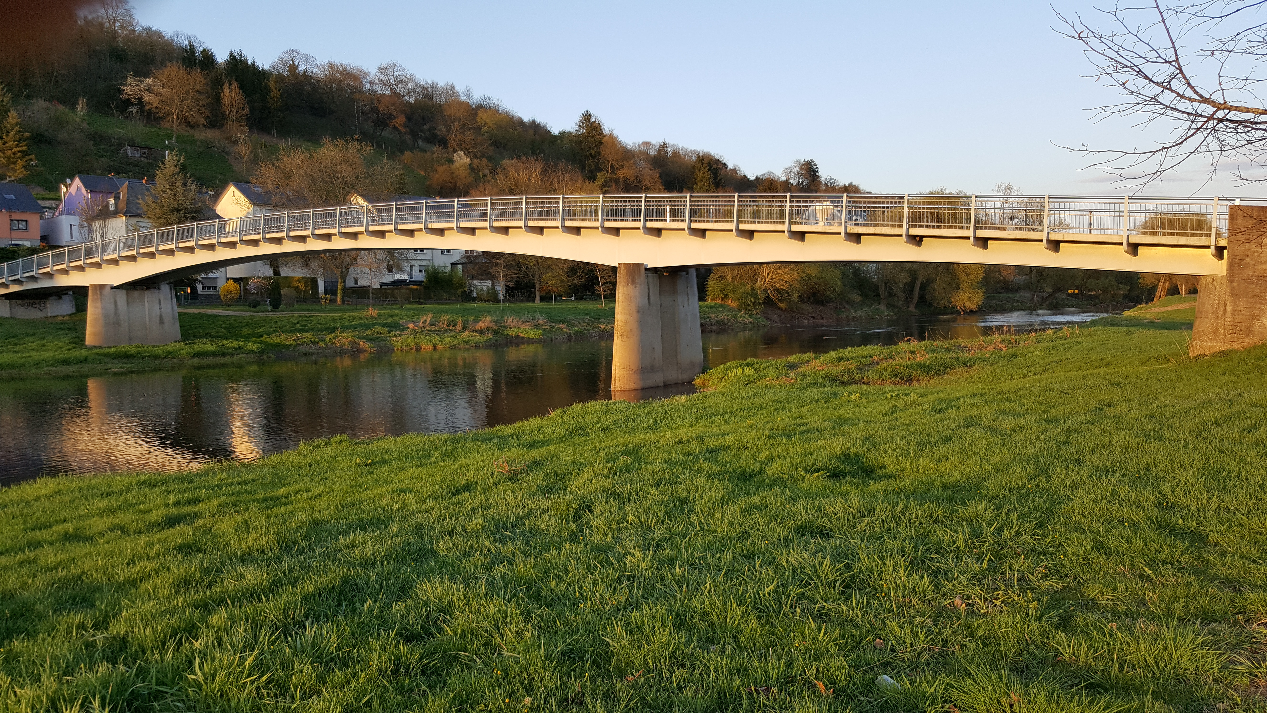 Déi sougenannte 'Stole Bréck' zu Dikrech am Abrëll 2017